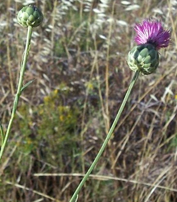 Mantisalca duriaei - Capítulos en pre antesis y en plena floración - Manfredonia (Prov. de Foggia, Italia)